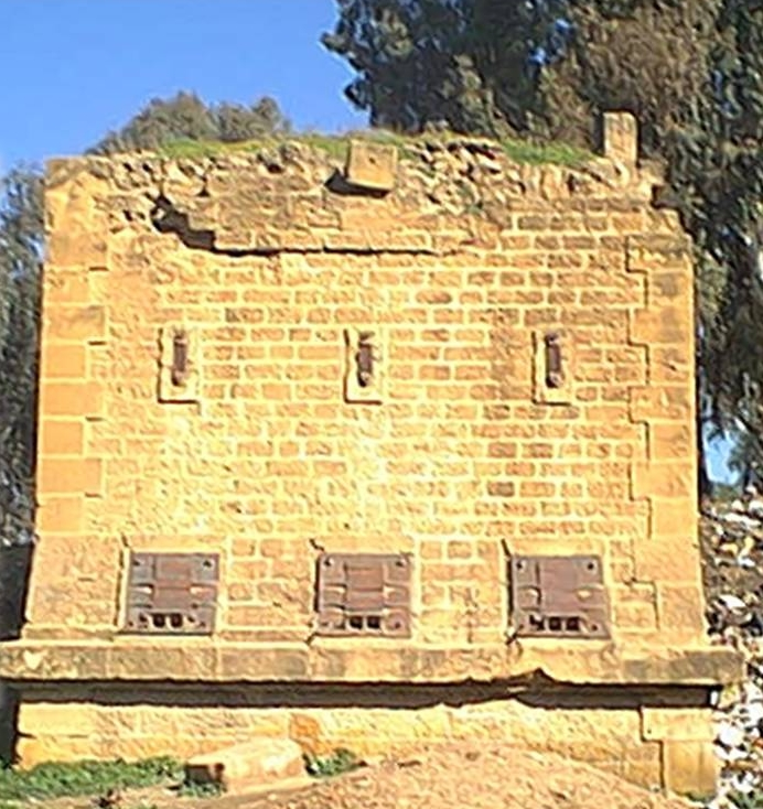 Vestiges du culée de l'ancien pont de la Ferme, construit en 1869 (Photo prise 1999)